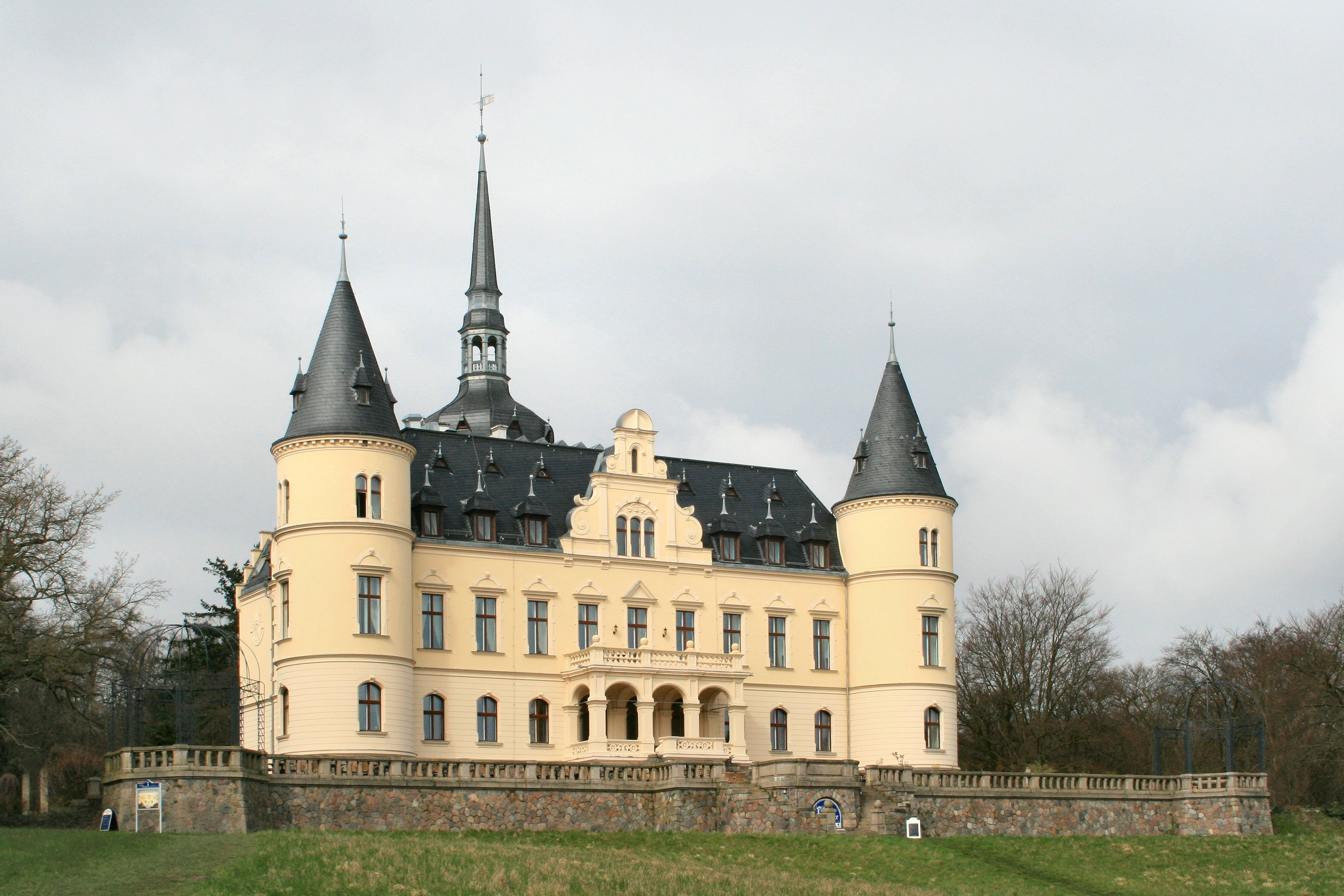 Schloss Ralswiek auf der Insel Rügen an der südlichsten Bucht des Großen Jasmunder Boddens (1893–1896 erbaut)